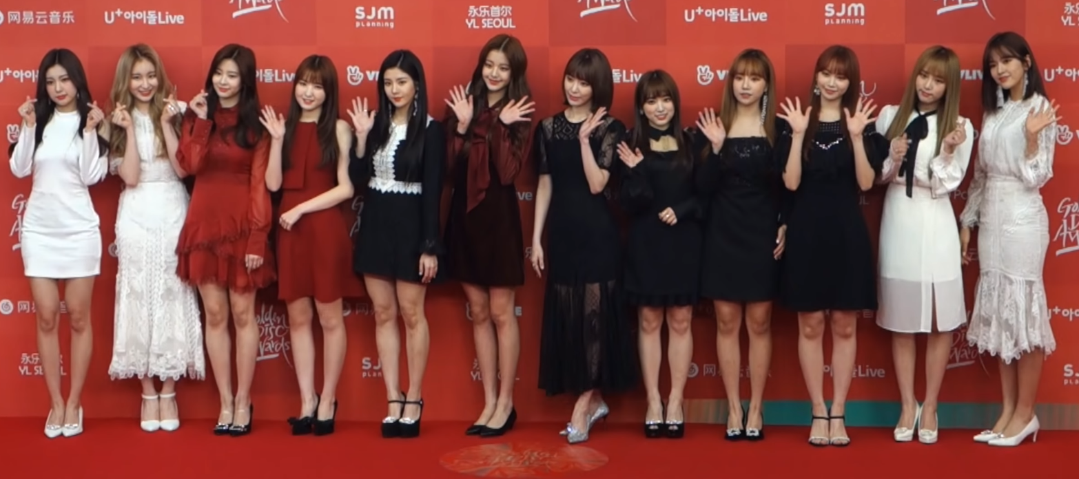 1월 6일 오후 서울시 고척동 고척스카이돔에서 '제33회 골든디스크시상식' 앨범부문 시상식 레드카펫 행사가 열려 포토월에서 아이즈원이 포즈를 취하고 있다.